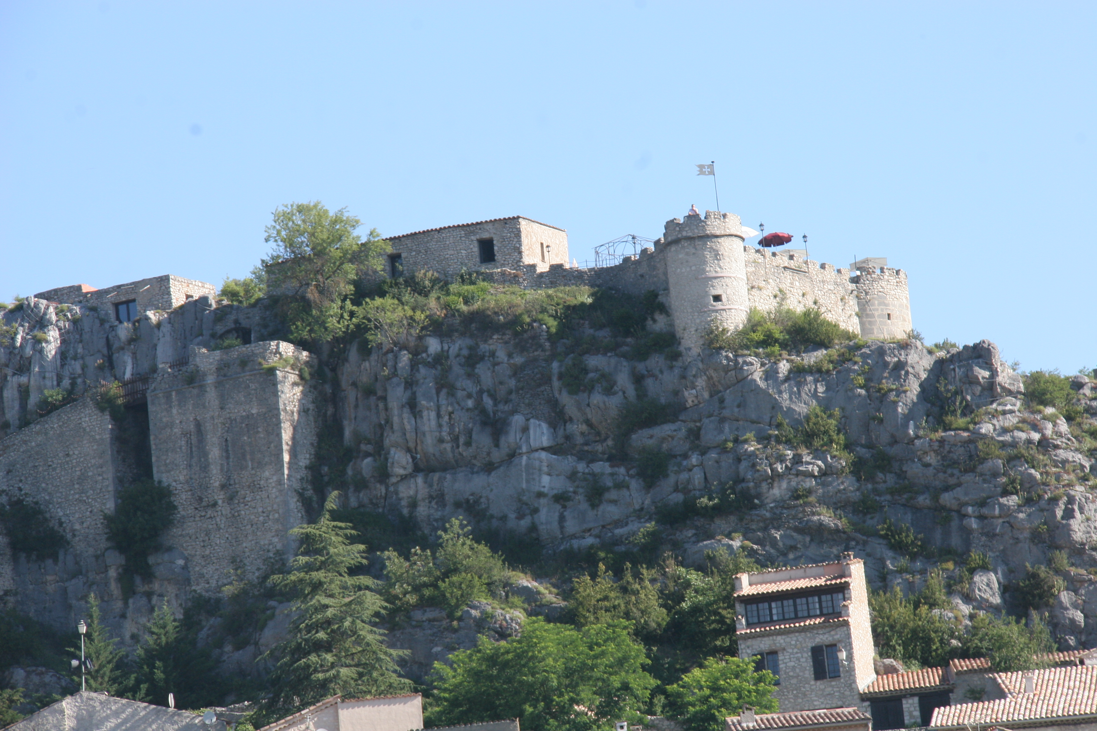 Chateau de Trigance